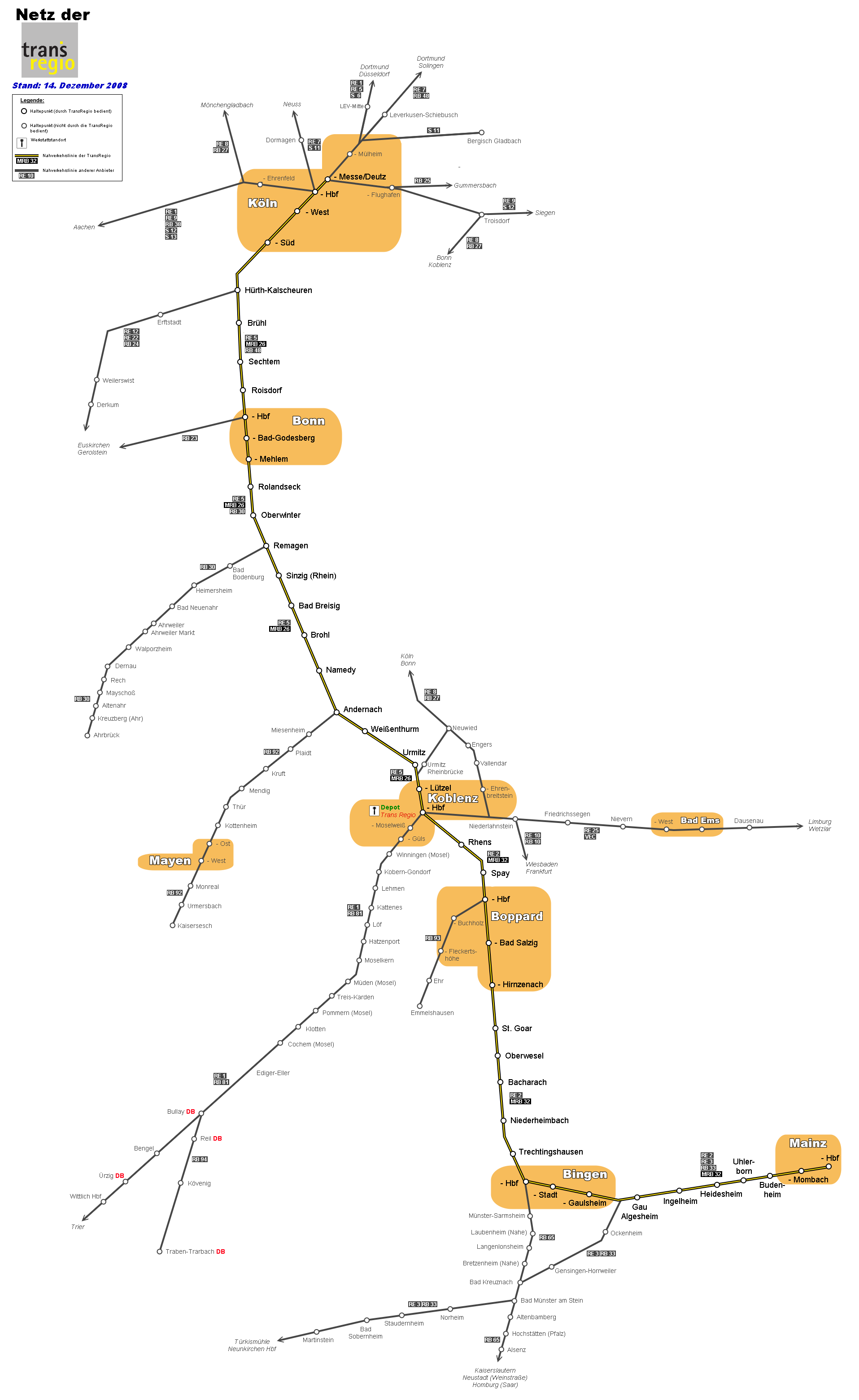 Netz der TransRegio (Stand: 14.12.2008)